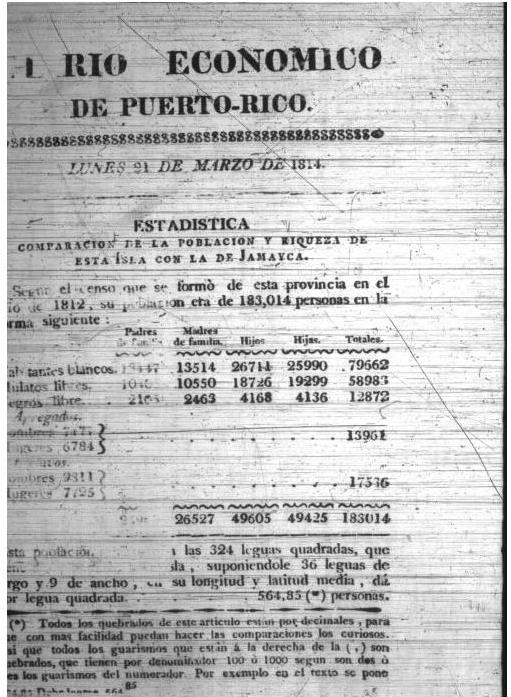 Diario Económico de Puerto Rico, de José de Andino y Amézquita (impreso en 1814)